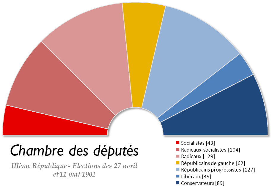 Chambre des députés française issue des élections législatives de 1902